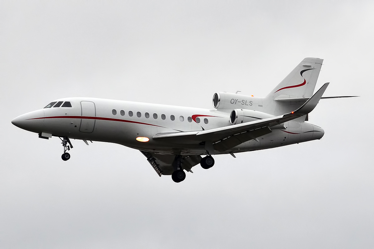 Air Alsie, OY-SLS, Dassault Falcon 900EX